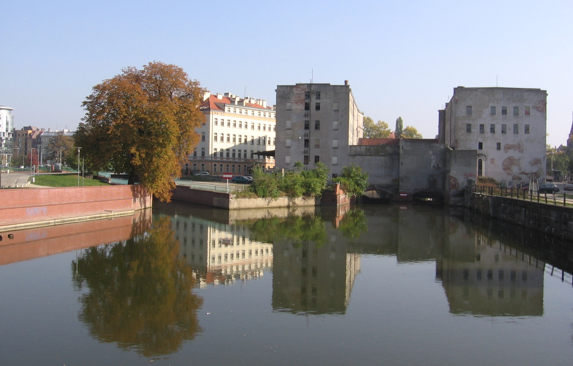 Wyspa Młyńska we Wrocławiu widziana od strony zachodniej, z Kładki Piaskowej. Przy prawym skraju kadru widać samochody stojące na ul. Staromłyńskiej znajdującej się na Wyspie Piasek, w głębi tej uliczki widoczny jadący ulicą św. Jadwigi (w poprzek kadru) tramwaj; na lewo od ul. Staromłyńskiej dwa pięciopiętrowe gmachy Młyna Maria wraz z łączącym je niższym pawilonem wzniesionym nad rynnami roboczymi młyna; gmach po lewej stoi na Wyspie Młyńskiej tak, jak widoczny na lewo od niego żółtawobeżowy budynek (z czerwonym dachem) dawnego technikum spożywczego, obecnie hotel; na lewo od Wyspy Młyńskiej widoczny kanał, oddzielający ją od sąsiadującej z nią Wyspy Słodowej (drzewo widoczne na zdjęciu rośnie właśnie na Wyspie Słodowej).